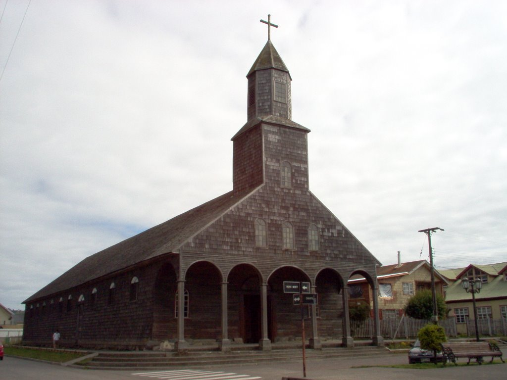 Iglesia de Achao, capital de Quinchao